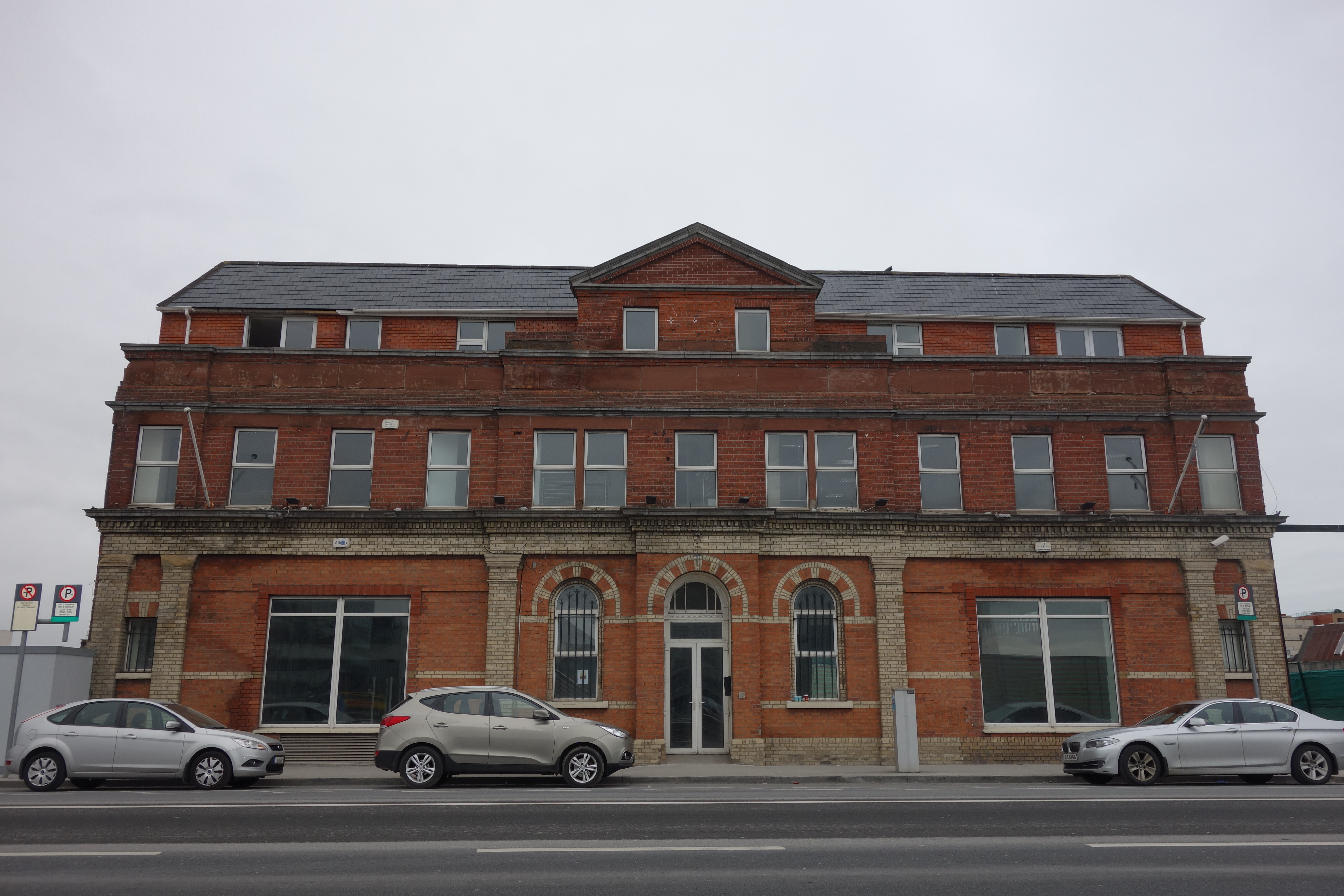 73 North Wall Quay, Dublin